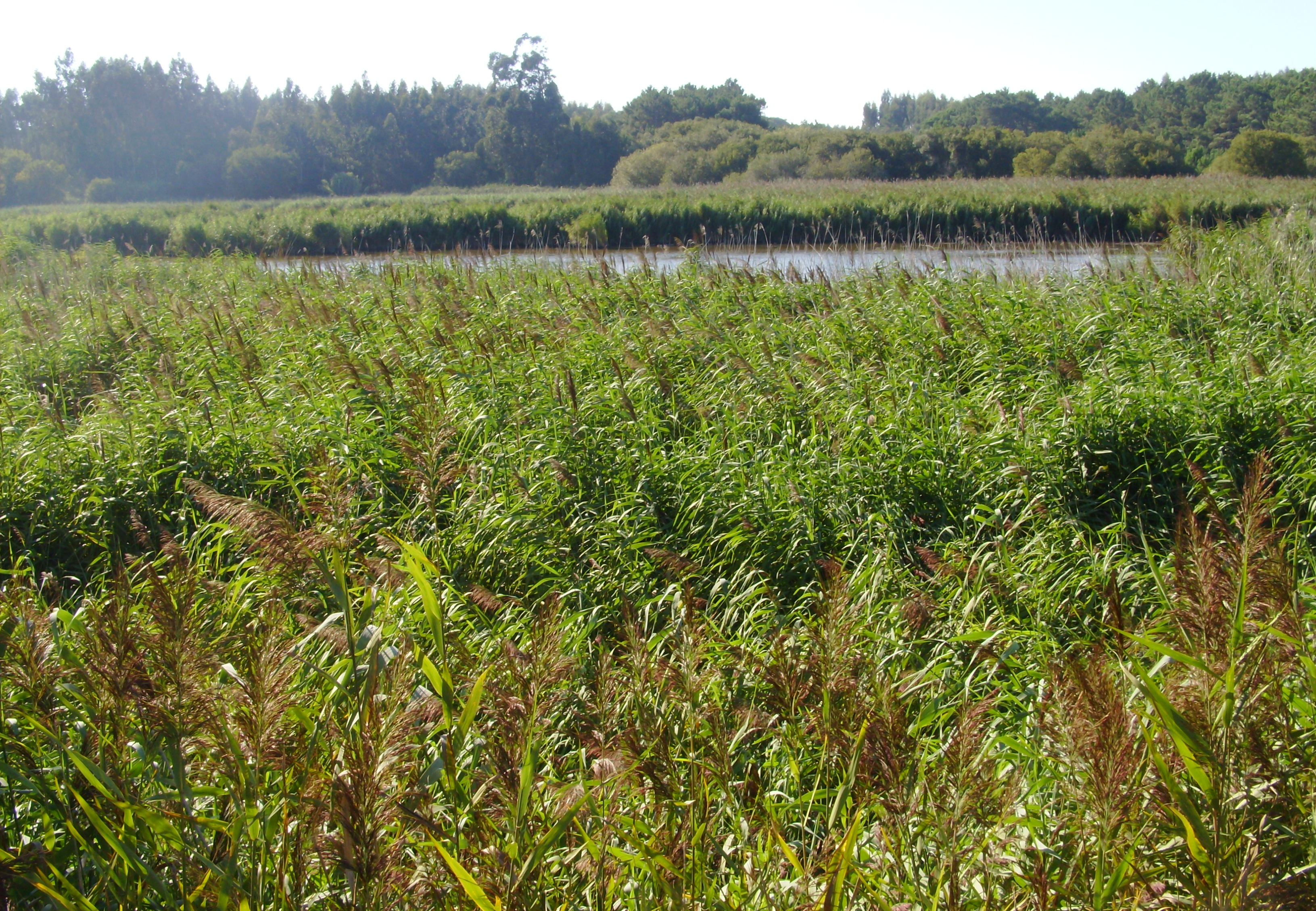 Paul de Tornada, Tornada, Caldas da Rainha, Distrito de Leiria, Portugal.